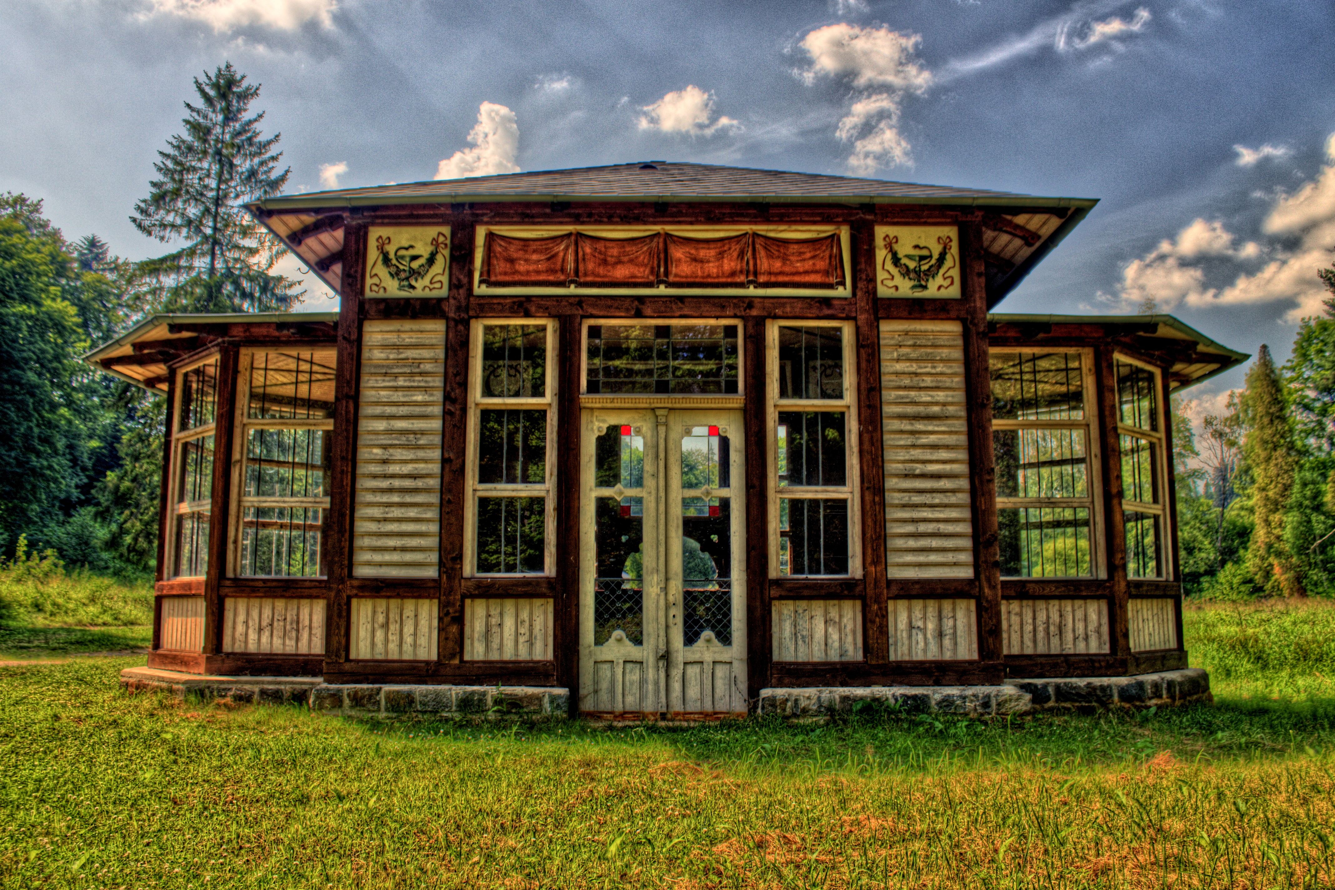 Lázeňský dům - areál lázní, s omezením: bez čp. 105 Penzion Marie na pozemku st. parc. č. 105, k. ú. Staré Těchanovice a pozemku parc. č. 1164, k. ú. Moravice (Jánské Koupele), Jánské Koupele 75